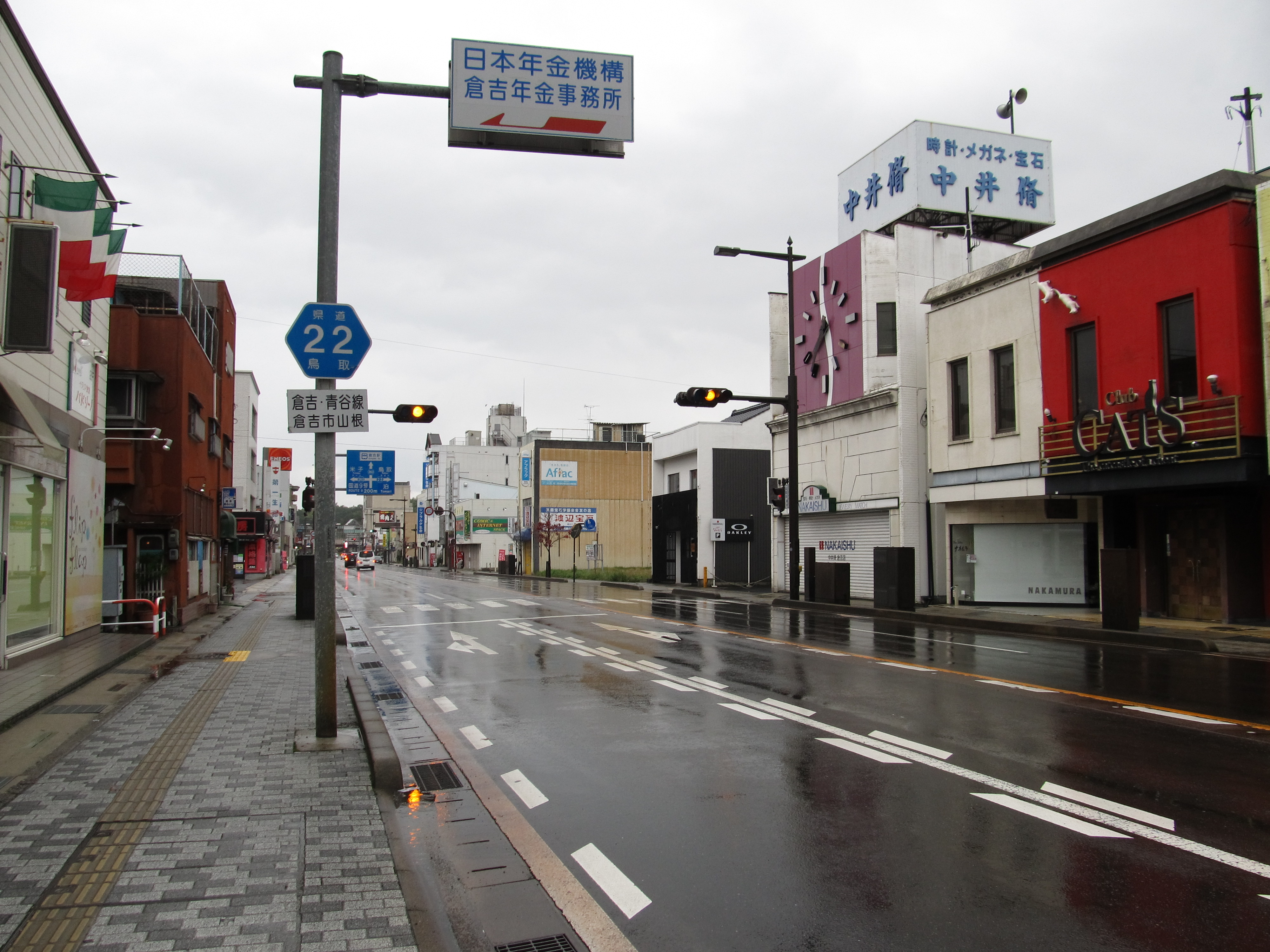 鳥取県道22号倉吉青谷線（倉吉市山根、倉吉年金事務所付近で撮影）。